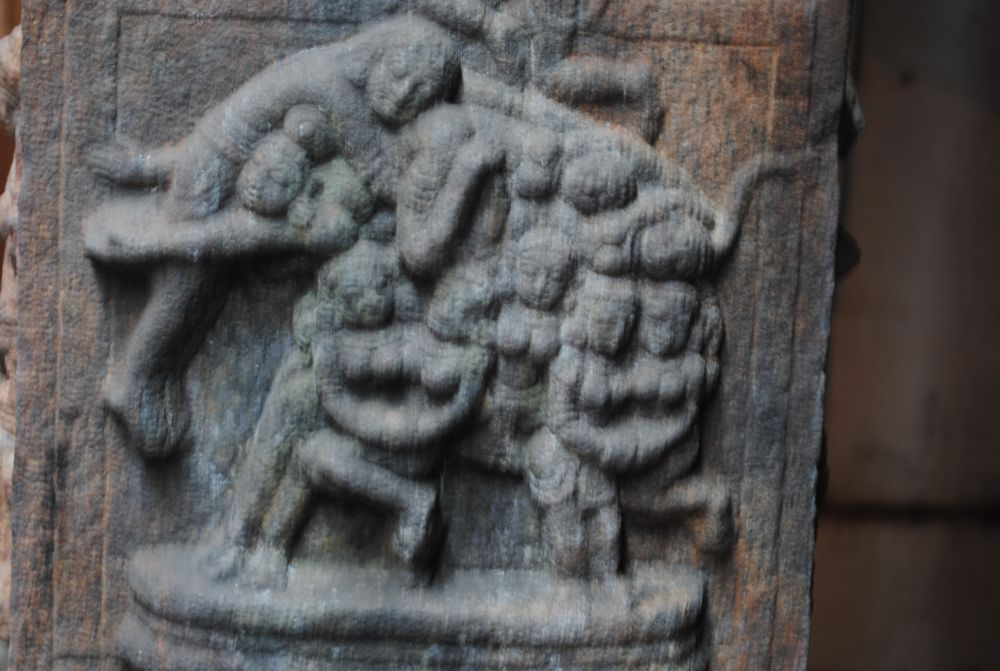 நவநாரிக்குஞ்சரம் என்ற 9 பெண்களைக் கொண்ட யானைச் சிற்பம். அரியவகை சிற்பம். 15 ஆம் நூற்றாண்டு.